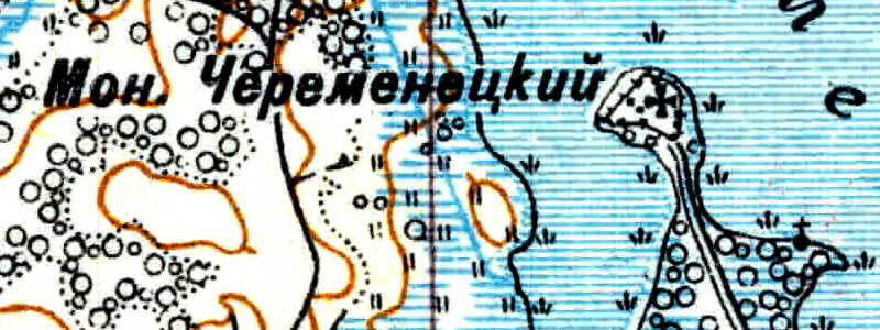 Топографическая карта Ленинградской области, квадрат Vc-29 (Батецкая), местечко Череменец